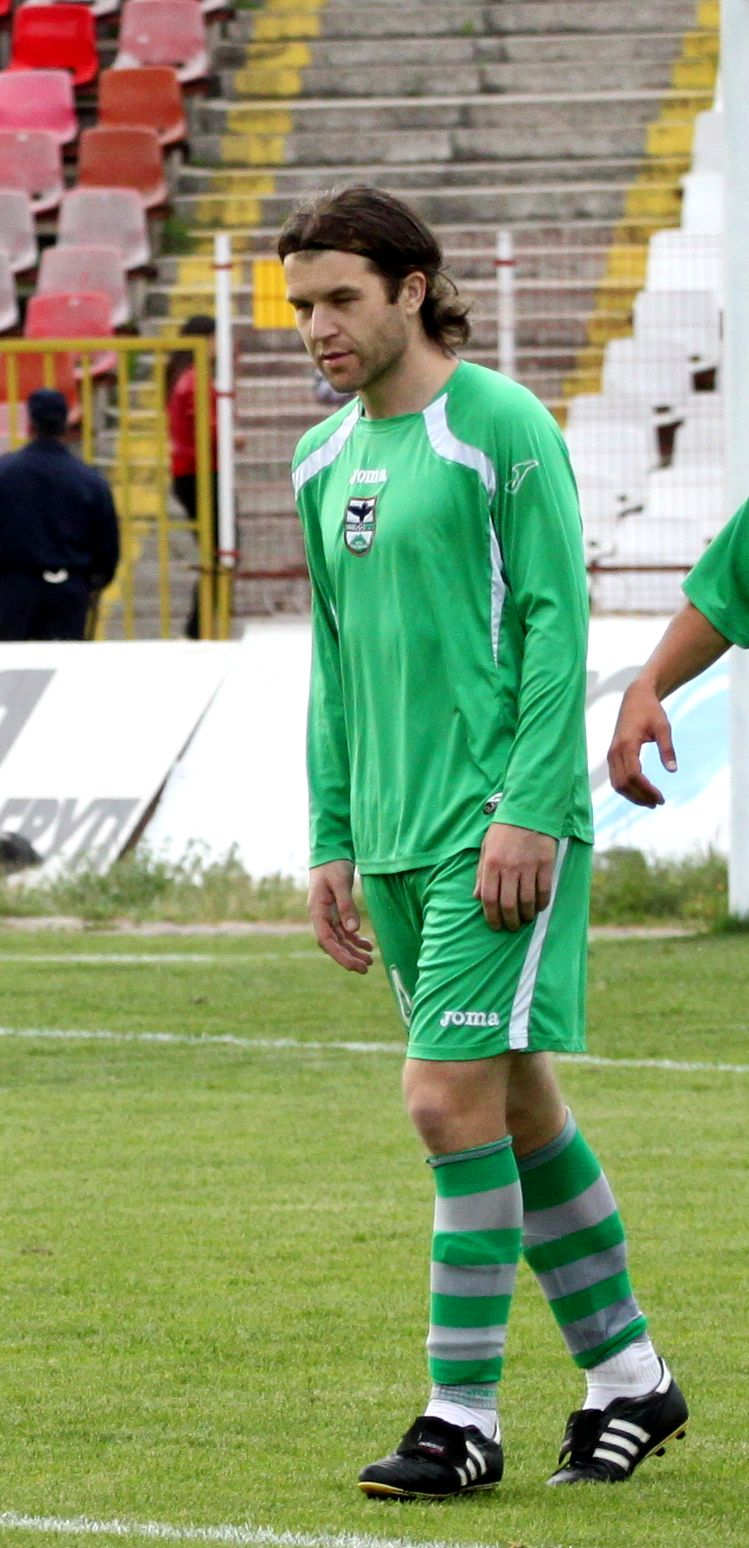 Иван цветков - български футболист, състезател на Пирин Благоевград